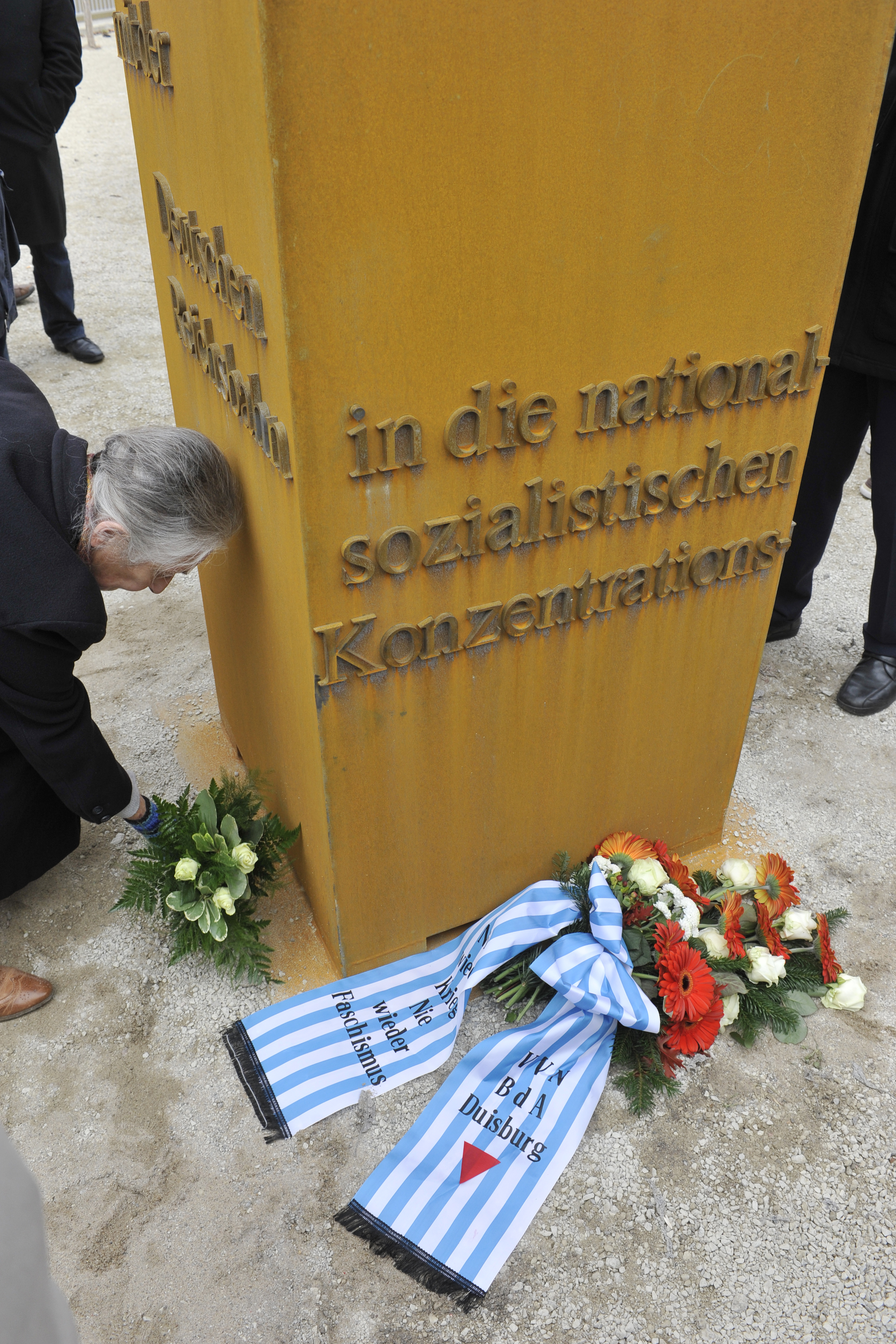 Enthüllung des Mahnmals mit Kranzniederlegung